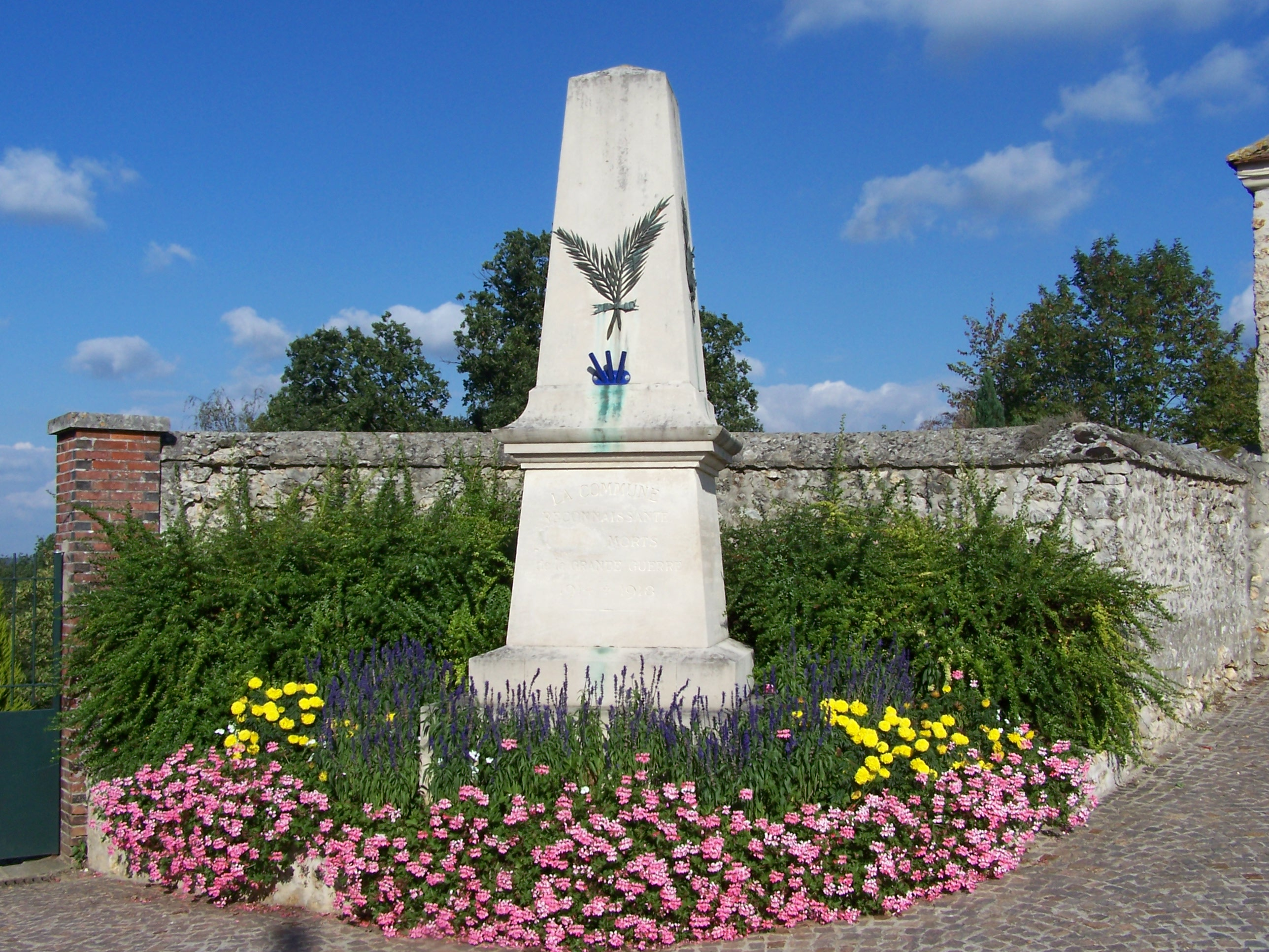 Monument aux morts de Saint-Rémy-l'Honoré (Yvelines, France)